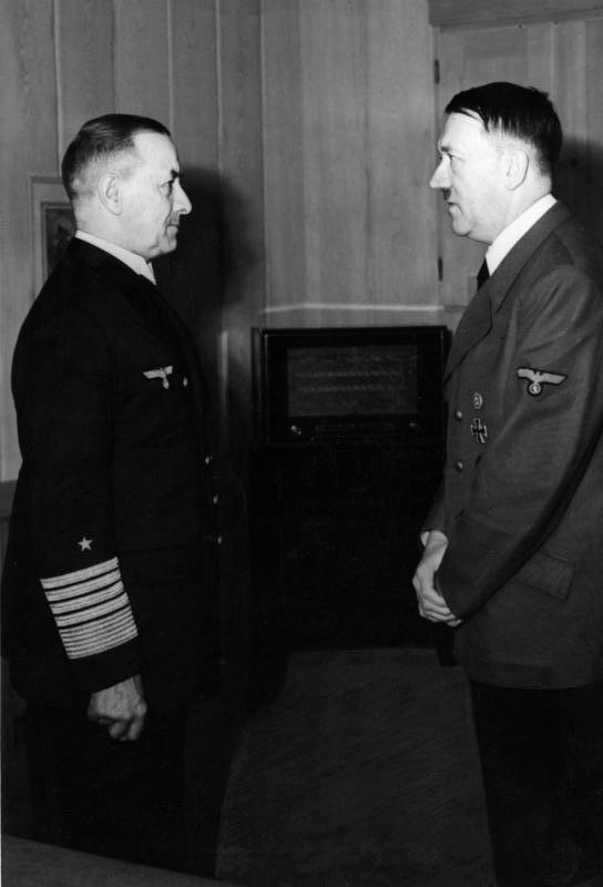 Erich Raeder, Adolf Hitler Zentralbild In seinem Hauptquartier empfing Hitler Großadmiral Raeder, aus Anlaß seiner Ernennung zum Admiralinspekteur der Kriegsmarine des faschistischen Deutschland. Aufn. 1943 [Entlassung von Erich Raeder (links) als Oberbefehlshaber der Kriegsmarine und Ernennung durch Adolf Hitler zum "Admiralinspekteur"; Ende Januar / Anfang Februar 1943] Abgebildete Personen: Hitler, Adolf: Reichskanzler, Deutschland Raeder, Erich: Großadmiral, Oberbefehlshaber der Kriegsmarine, Deutschland (PND 118743511)